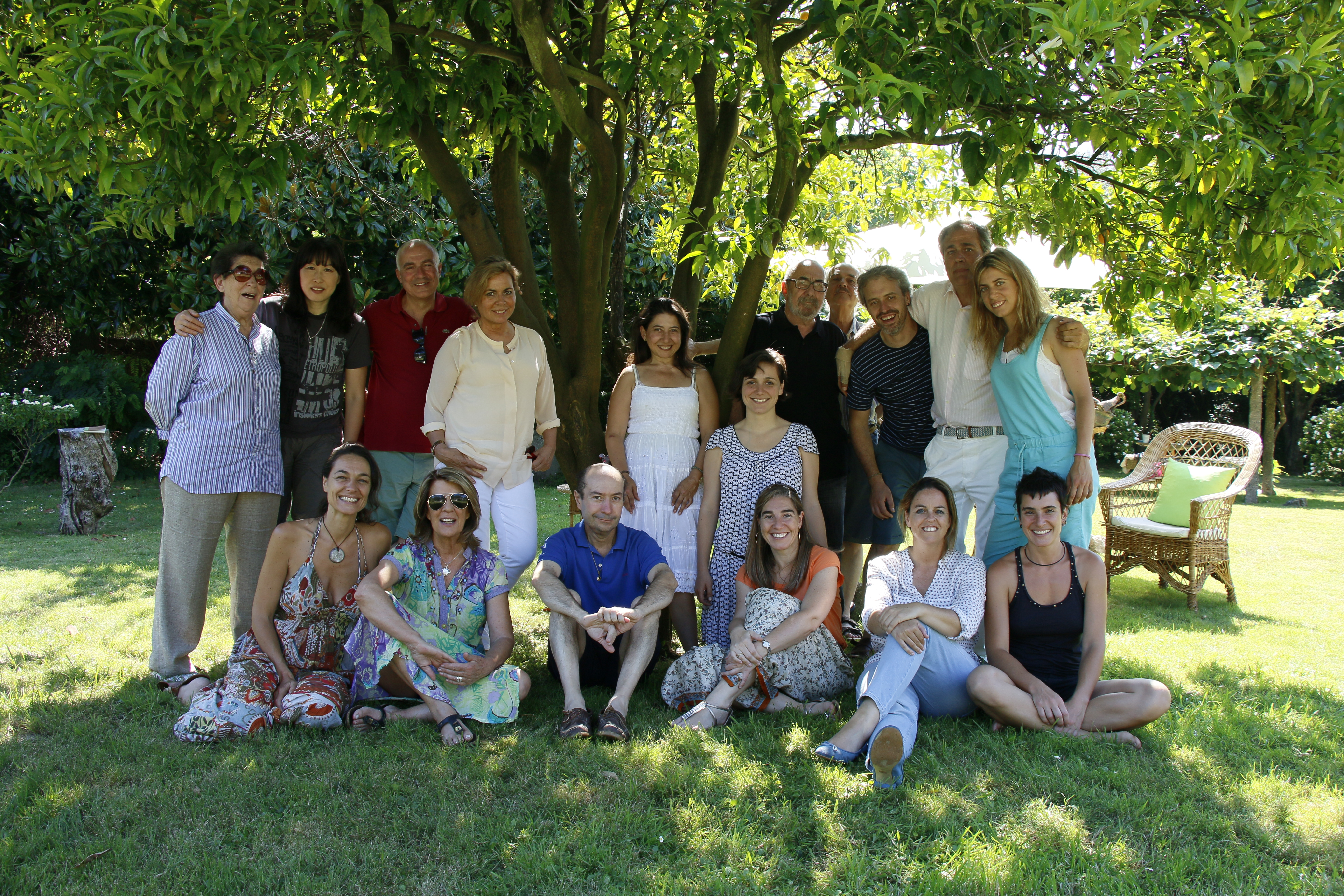 Luis Javier Gayá junto a sus compañeros del "II encontro internacional de artistas visuais". Viana do Castelo.